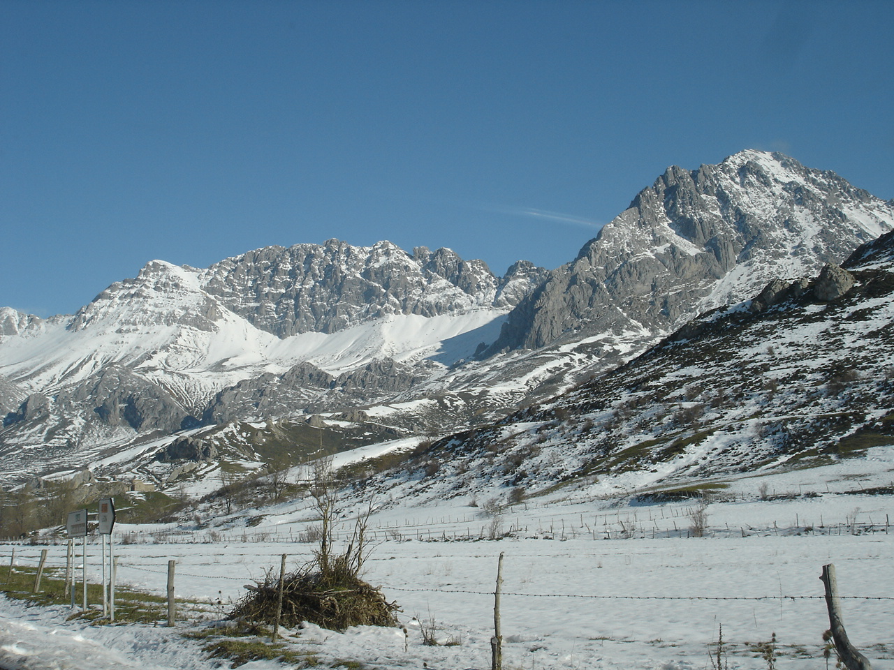 Peña Ubiña desde la carretera de Torrebarrio